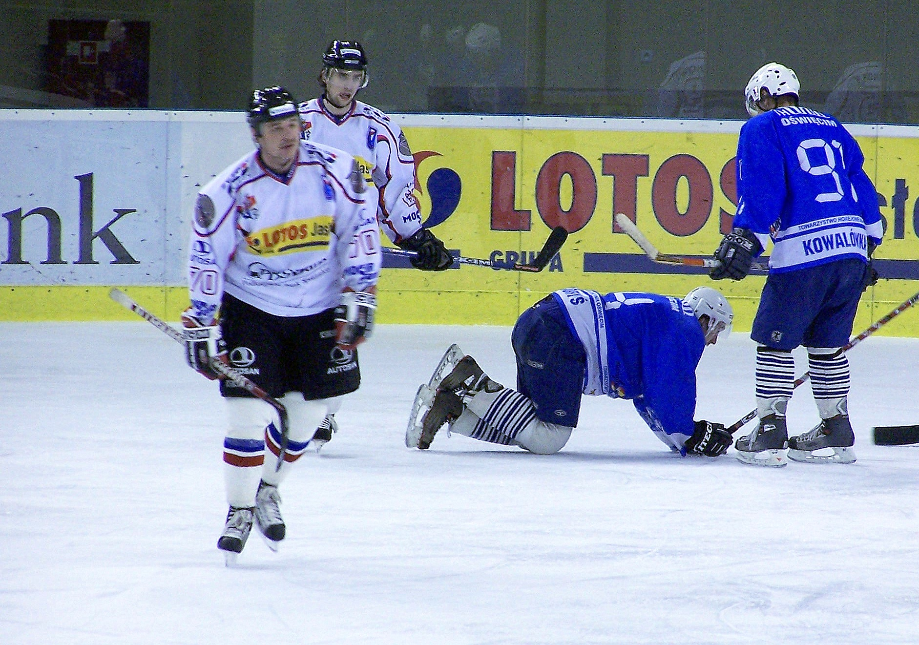 Hokeiści od lewej Marcin Ćwikła, Pavol Melicherčík (KH Sanok), Jerzy Gabryś i Sebastian Kowalówka (Unia Oświęcim) w meczu KH Sanok - Unia Oświęcim (6:2) 14 stycznia 2007.